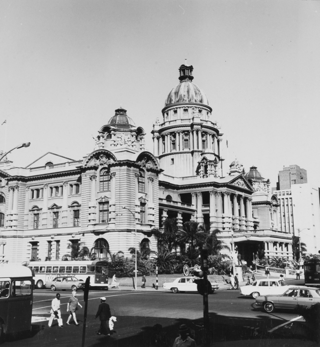 Het gebouw is gebaseerd op de City Hall van Belfast en ontworpen door Stanley G. Hudson. Het stadhuis werd geopend in 1910 en biedt nu onderdak aan het Natural Science Museum, de eThekeini Art Gallery en een bibliotheek. Het museum toont opgezette dieren, een dodo skelet en Zuid-Afrika's enige Egyptische mummie.